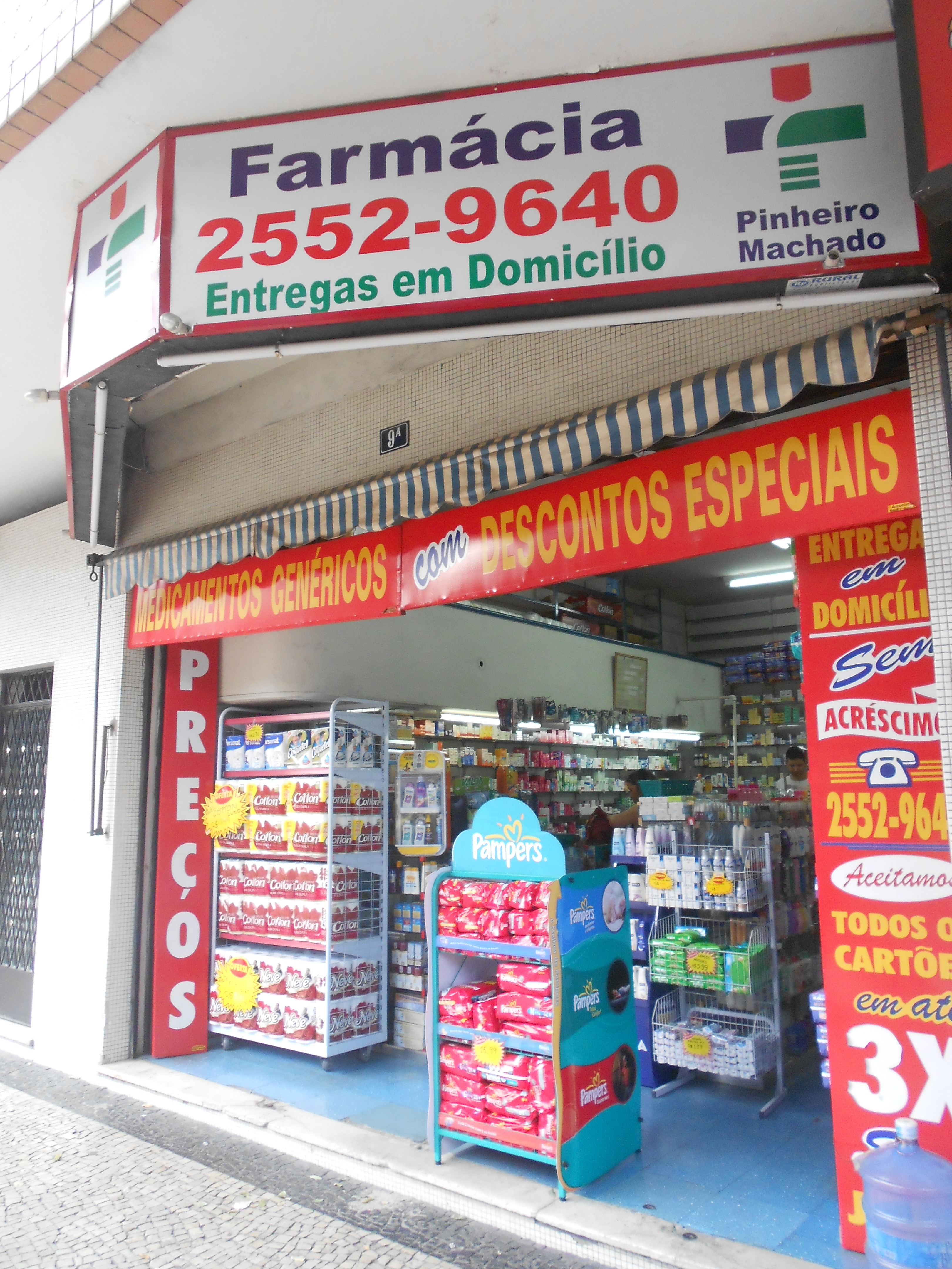 Farmácia Pinheiro Machado, situado na rua de mesmo nome, em Laranjeiras, Rio de Janeiro, Brasil.